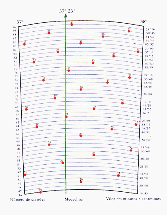 Esquema em que se mostram graficamente as posições do nónio, entre os 37 e 38º. Desejando medir um ângulo de 37º 23’ (onde se colocou a medeclina), constata-se que a posição do nónio mais perto deste valor é a 27ª na escala dividida em 65 posições. A leitura teria sido feita com um êrro de .08’.